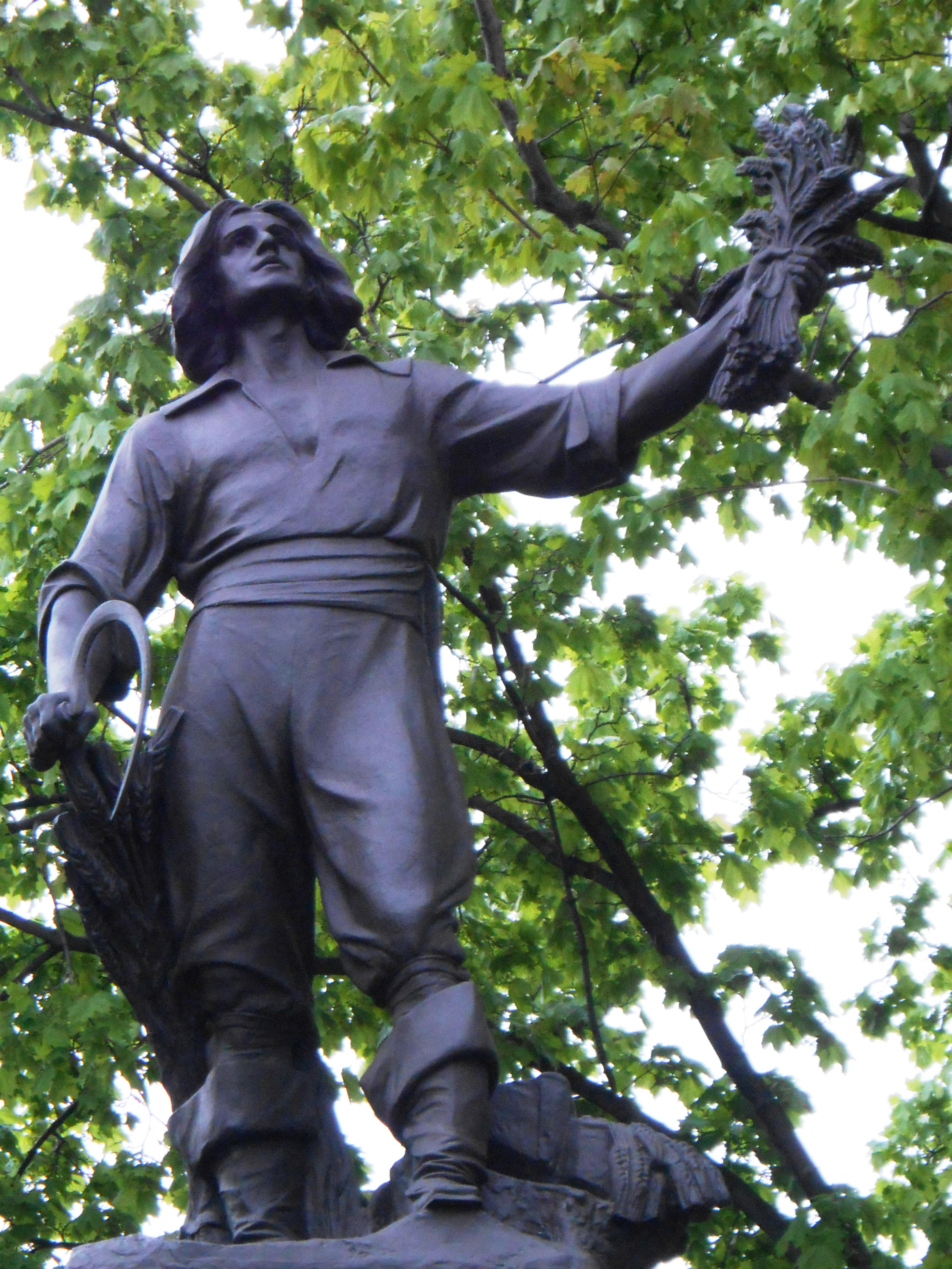 « Le monument Louis-Hébert (1575-1627) avait été initialement installé à la place de l'Hôtel de Ville, où il fut dévoilé le 3 septembre 1918, pour commémorer le troisième centenaire de l'arrivée en 1617 de cet apothicaire français qui est devenu le "premier colon canadien". Le monument fut démonté en 1971 et ultérieurement déménagé dans le parc Montmorency, au sommet de la côte de la Montagne. Les terres de Louis Hébert s'étendaient sur le site actuel de la Basilique Notre-Dame de Québec, du Séminaire, de l'Hôtel-Dieu, et des rues Hébert et Couillard. La statue en bronze de Louis Hébert au sommet du monument, et les personnages des hauts-reliefs en bronze reposant les socles, sont l'œuvre du sculpteur montréalais Alfred Laliberté. L'artiste a représenté Louis Hébert élevant une poignée d'épis de blé vers le ciel, offrant au Seigneur sa première récolte. Les personnages des hauts-reliefs sont : à droite, Marie Rollet, épouse Louis Hébert qui, assise au milieu de ses trois enfants, tient un livre et les instruit; à gauche, une statue du défricheur Guillaume Couillard, son gendre, appuyé sur une charrue. Le piédestal est orné de festons, d'écussons, et d'inscriptions incluant les noms des quarante-sept premiers colons de Québec. »